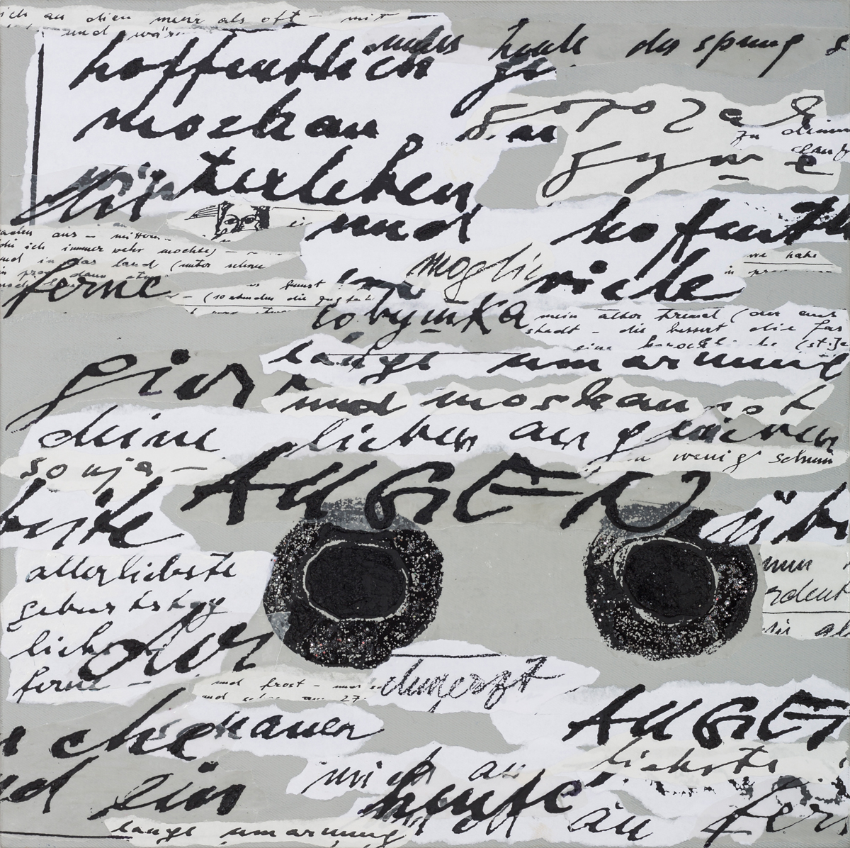 Sonia Jakuschewa, Milostné dopisy-Tvé oči I, 2005, akryl a koláž na plátně, 50 x 50 cm, foto Dirk Eisermann